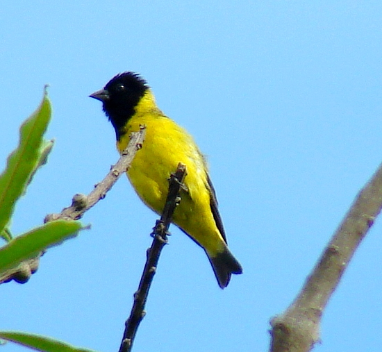 Macho. Description: Hooded siskin male (Carduelis magellanica) Creator: Luciano Carvalho Date: 21 de enero de 2008 (21-01-2008) Place: Brasil